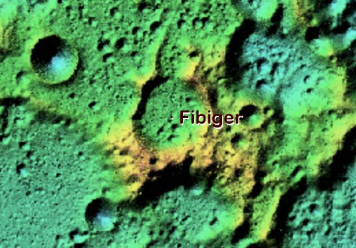 Cráter lunar Fibiger. Colores virtuales. (Imagen LROC LOLA)